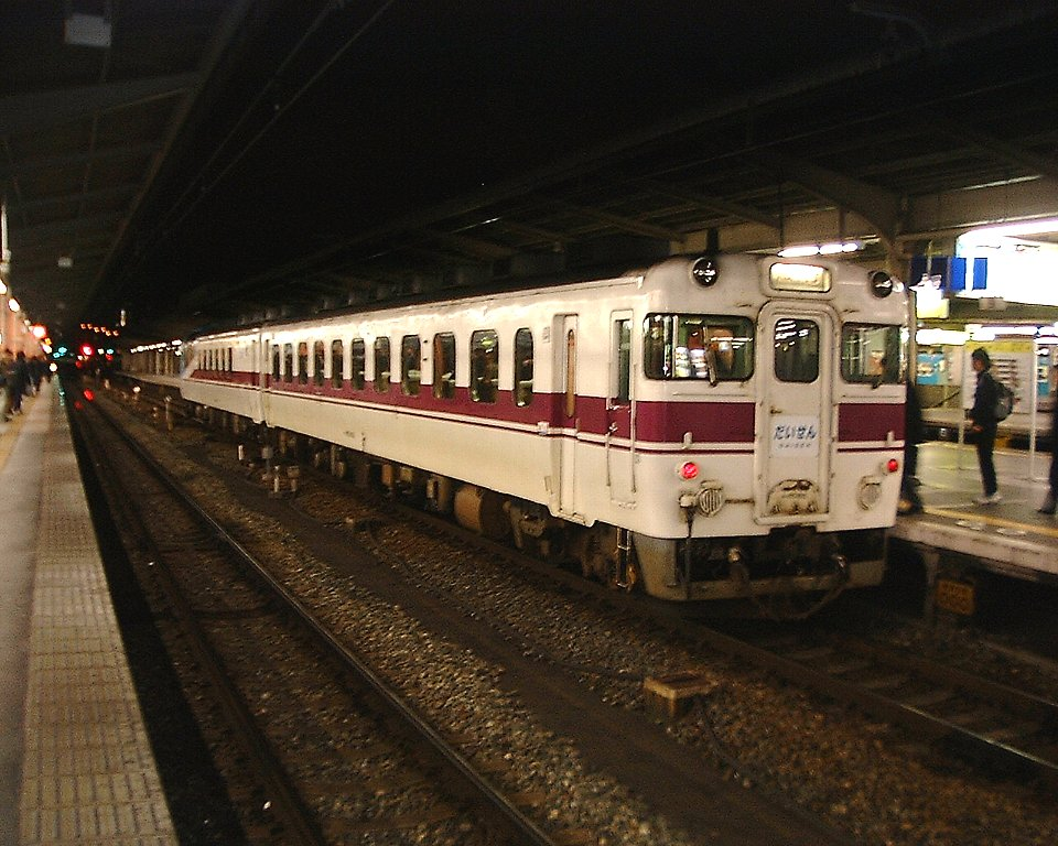 大阪駅に停車中のキハ65「だいせん」